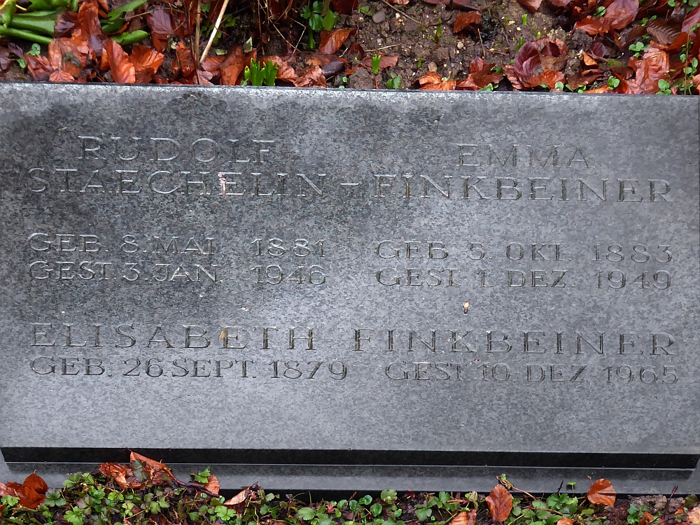 Rudolf Staechelin-Finkbeiner (1881–1946), Unternehmer, Kunstsammler, Familiengrab auf dem Friedhof Hörnli, Riehen, Basel-Stadt